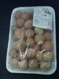 umbu, fruto da caatinga